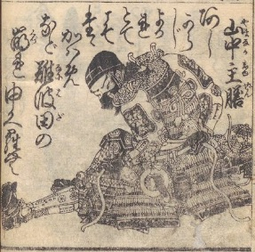 山中主膳の肖像